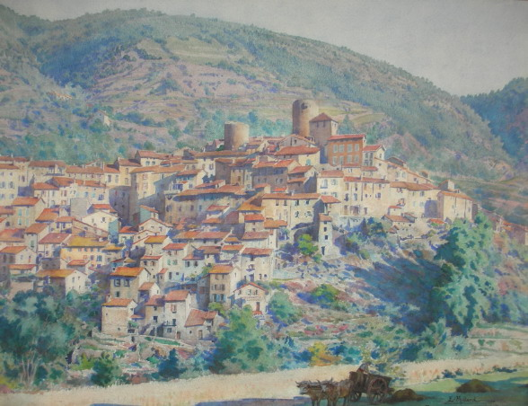 Vue du village de Palalda (circa 1900) (commune d'Amélie les Bains - Pyrénées Orientales)